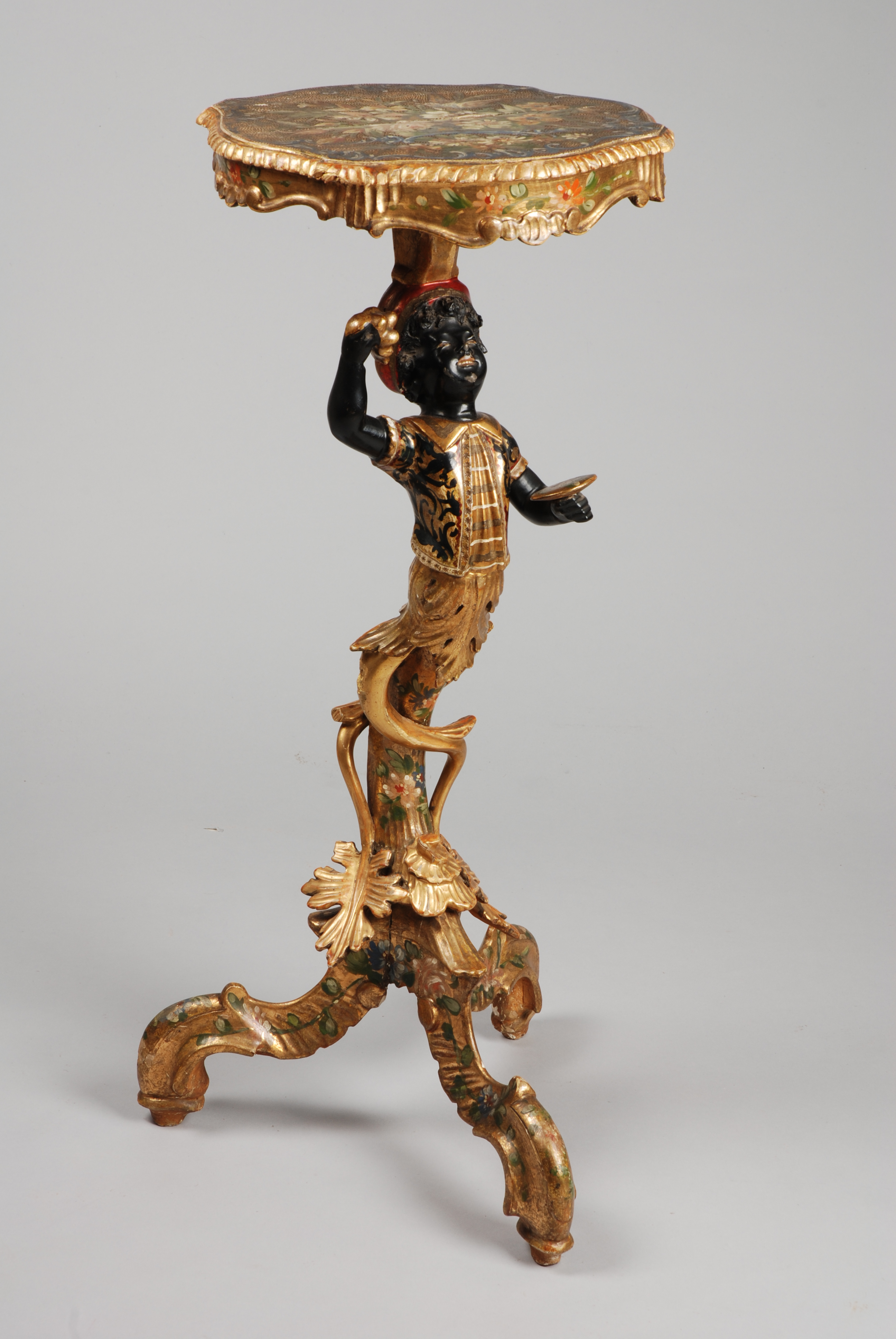 Objectgegevens Titel: Venetiaanse guéridon met moortje Beschrijving: Verguld en gepolychromeerd met bloemmotief, geschulpt blad, houtsnijwerk met veel krullen. Trefwoorden: guéridon, tafel, meubilair, interieurinrichting Plaats vervaardiging: Italië Datering: 1850 - 1900 Materiaal: hout, naaldhout, bladgoud, krijt, verf Afmetingen: (cm) hg 76,5 / br 34,0 / dp 36,0 / blad: br 31,5 / dp 29,5 Vorm & decoratie: meubel Inventarisnr: Museum Rotterdam 8246